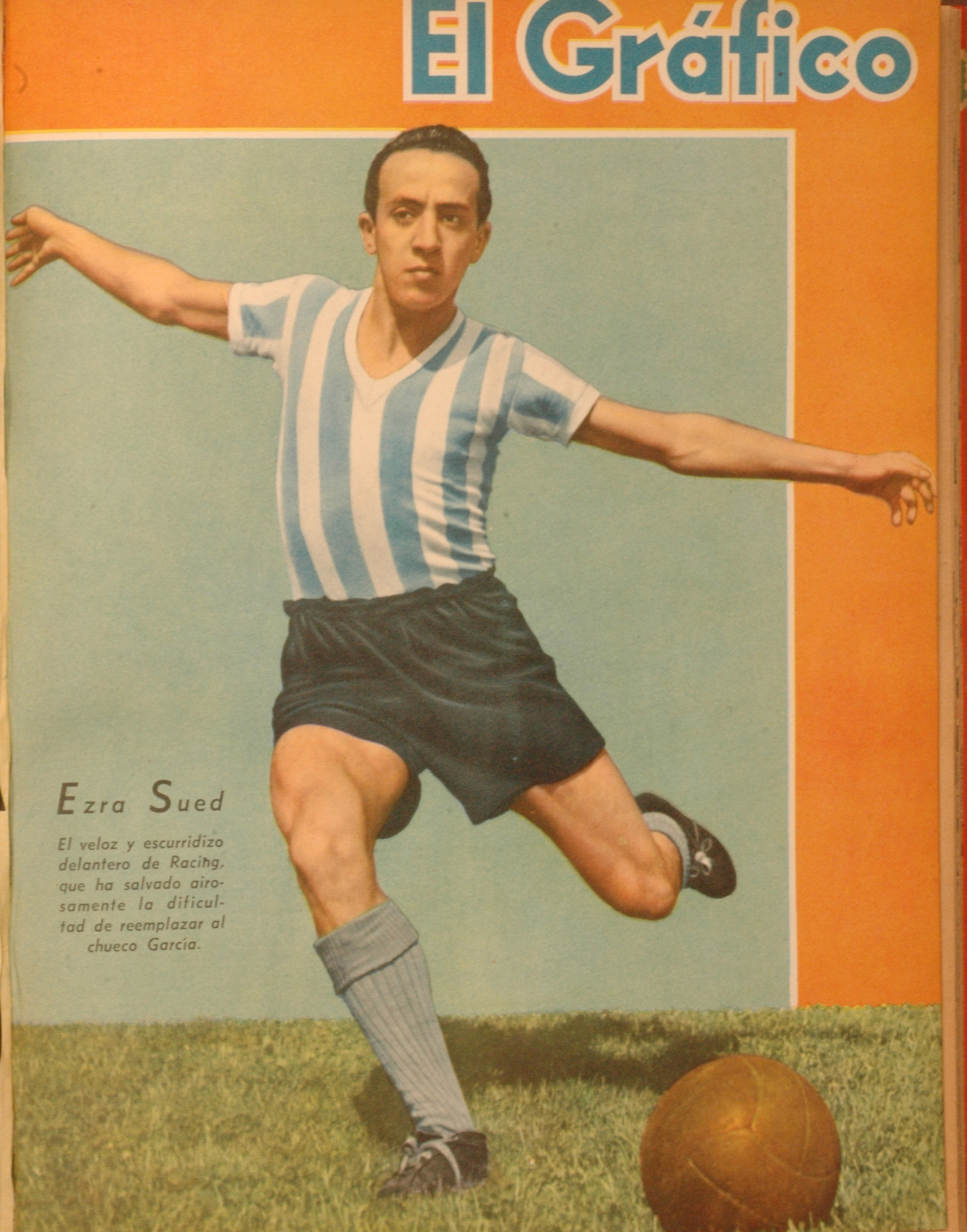 El Grafico del 29 de Octubre de 1943. Edicion 1268